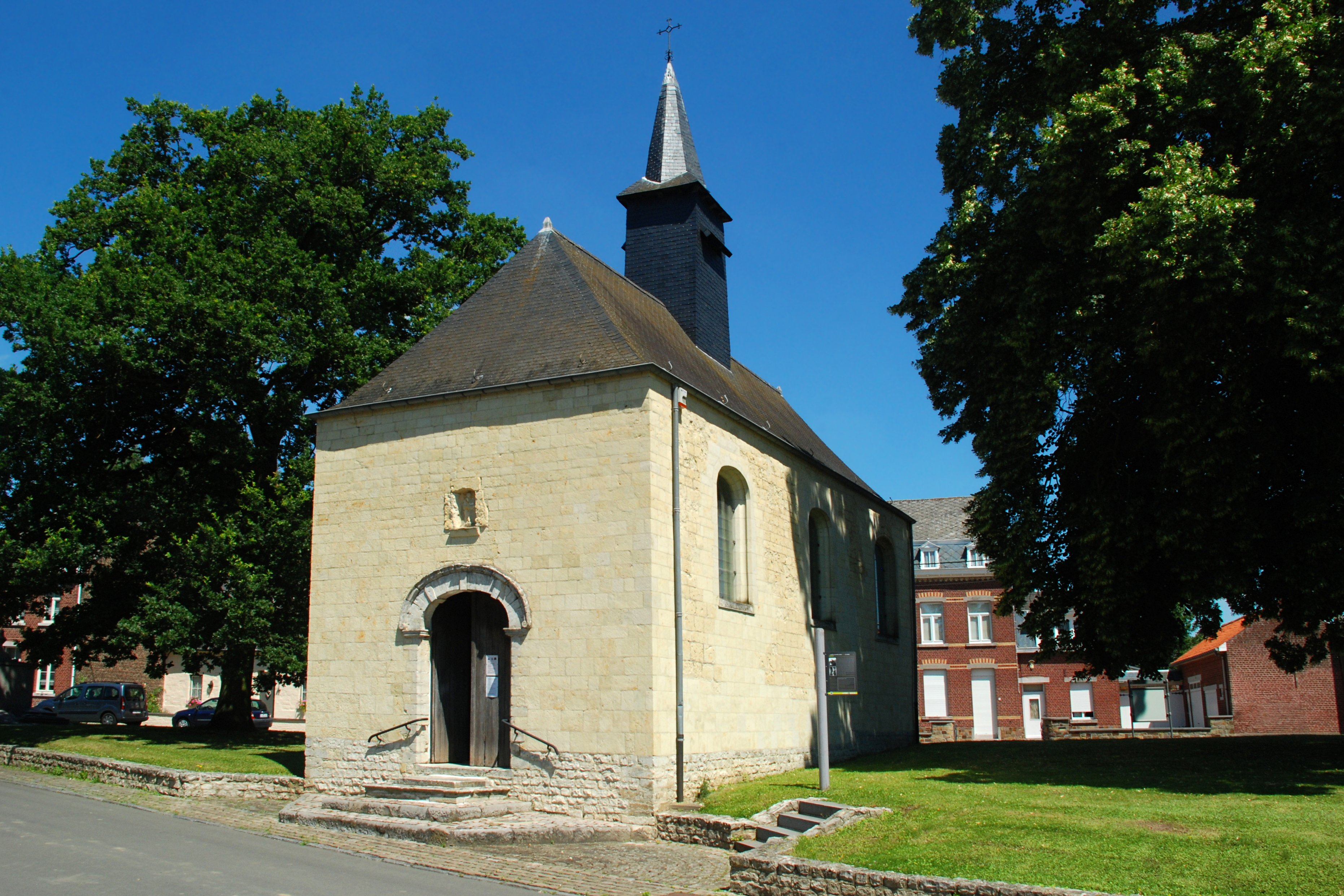 Belgique - Brabant wallon - Hélécine - Linsmeau - Chapelle Notre-Dame de la Colombe